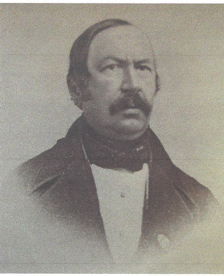 Porträtfotografie des Ulmer Chirurgen Johannes Palm (1794-1851)